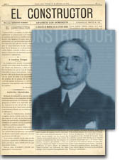 Ernesto Sureda, fundador del periódico El Constructor de Argentina. En el fondo de la imagen, la portadad de la primera edición.